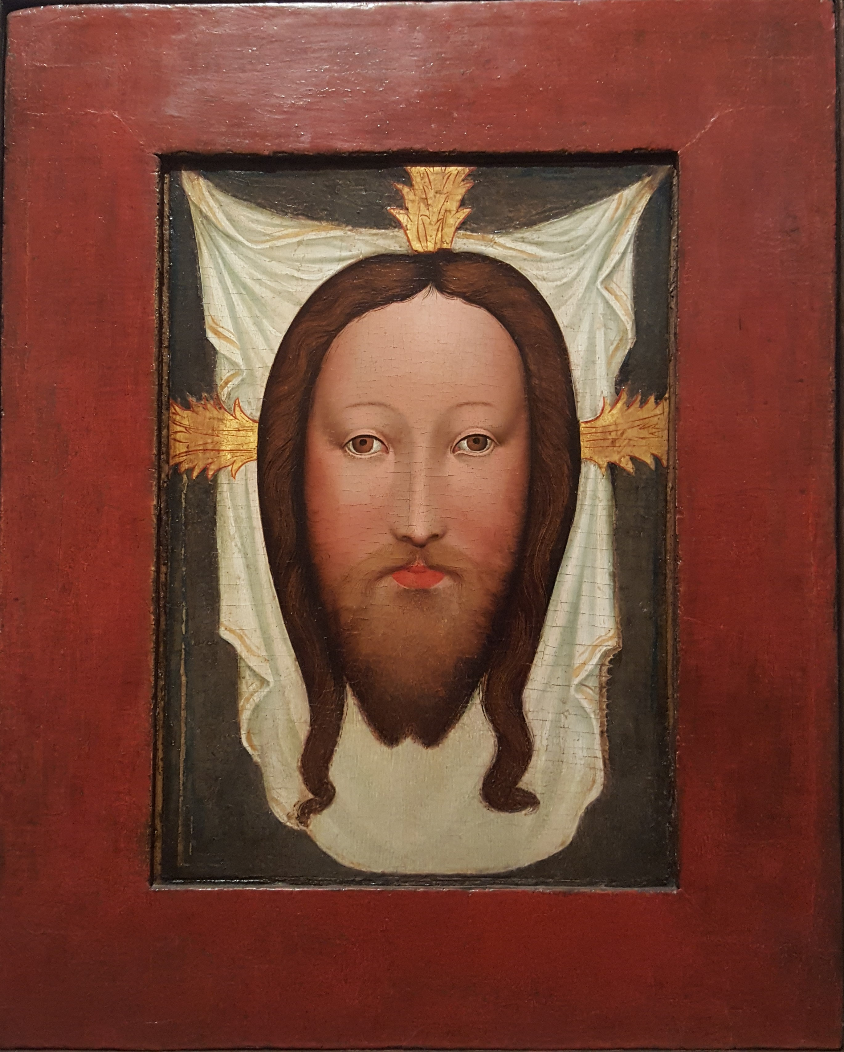 Madona Svatotomášská, revers Veraikon (1420-1440)